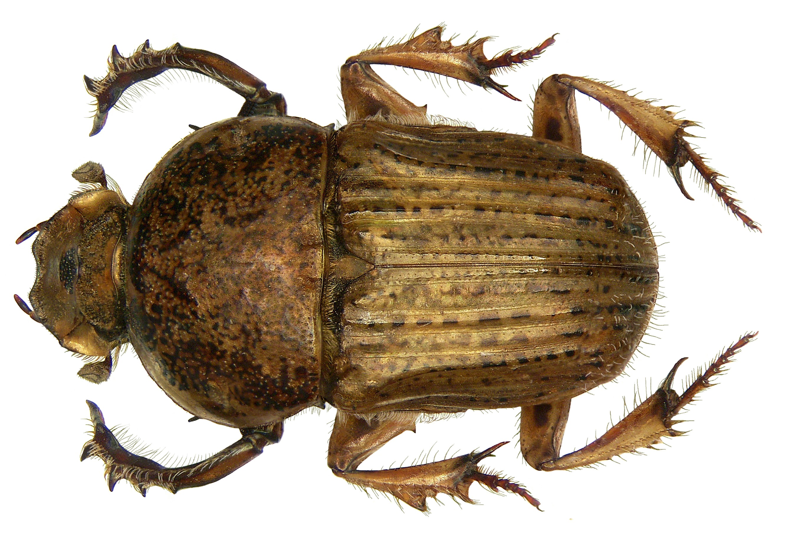 Familie: Scarabaeidae Größe: 11-14 mm Verbreitung: Namibia Fundort: Namibia, Etosha National Park leg.det. U.Schmidt, 1994 Foto: U.Schmidt, 2008